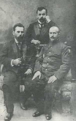 Димитър Чуповски, Наце Димов и Гаврил Константинович.